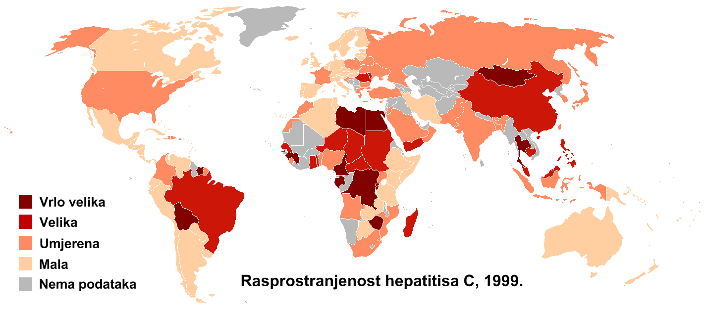 Geografska rasprostranjenost hepatitisa C, 1999.